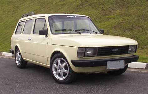 Fiat 147 Panorama, Brazil 1984.